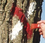 eigen foto